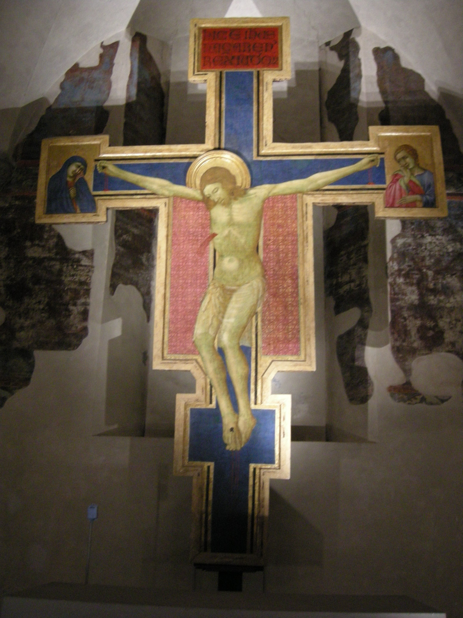 Museo di santa croce, crocifisso di lippo di benivieni